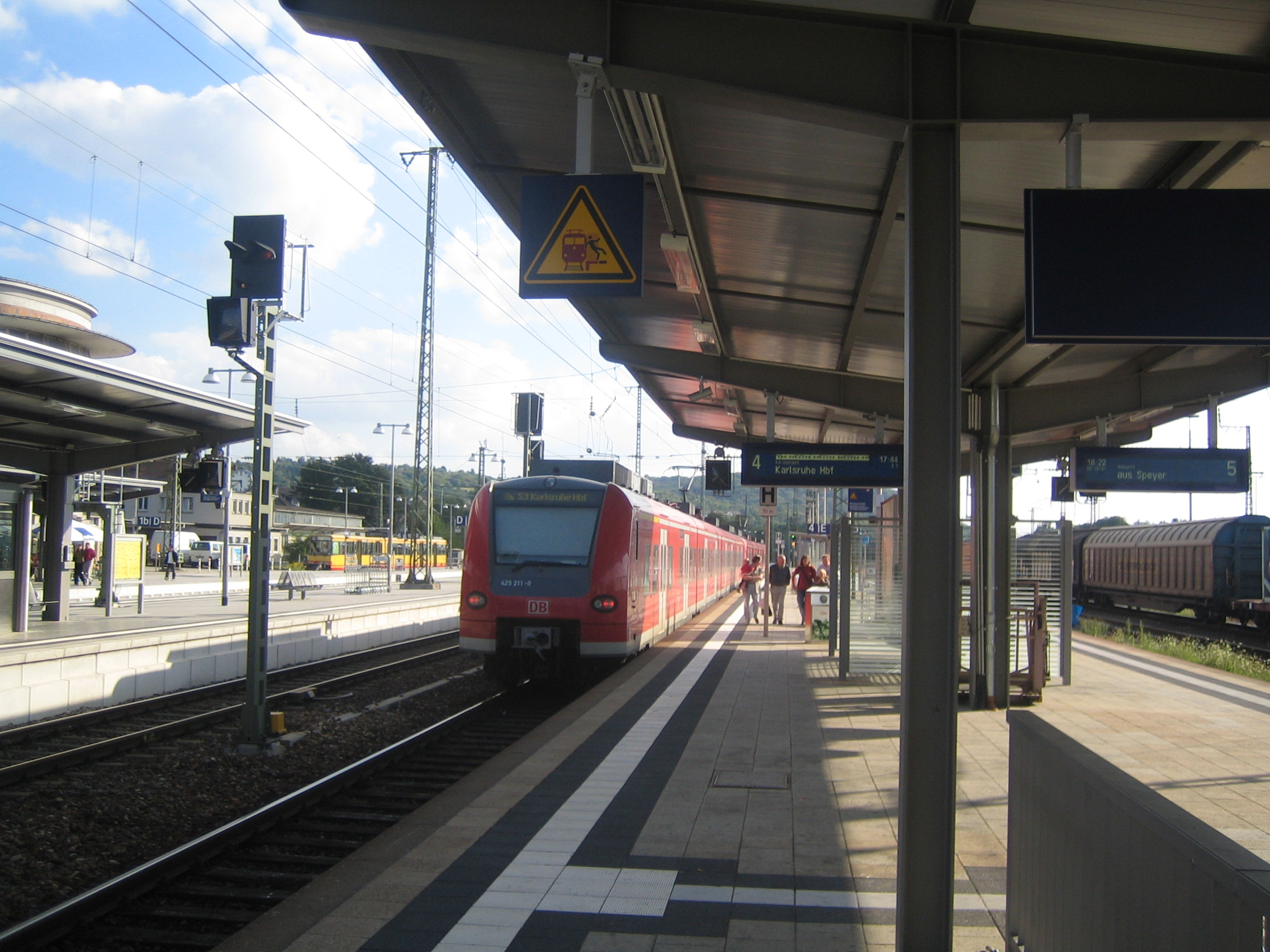 Rhein-Neckar-S-Bahn im Bahnhof Bruchsal, selbst fotografiert